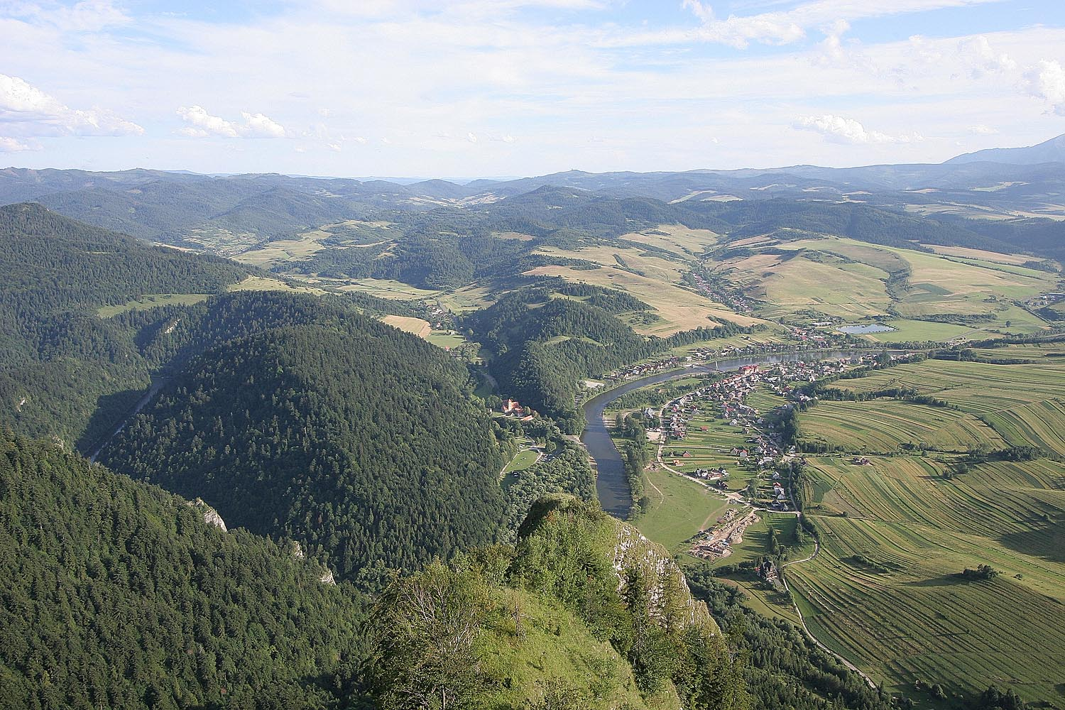 Trzy Korony wiew from Okruglica